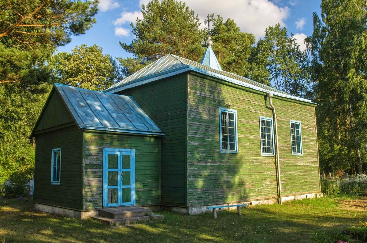 Забелле. Царква